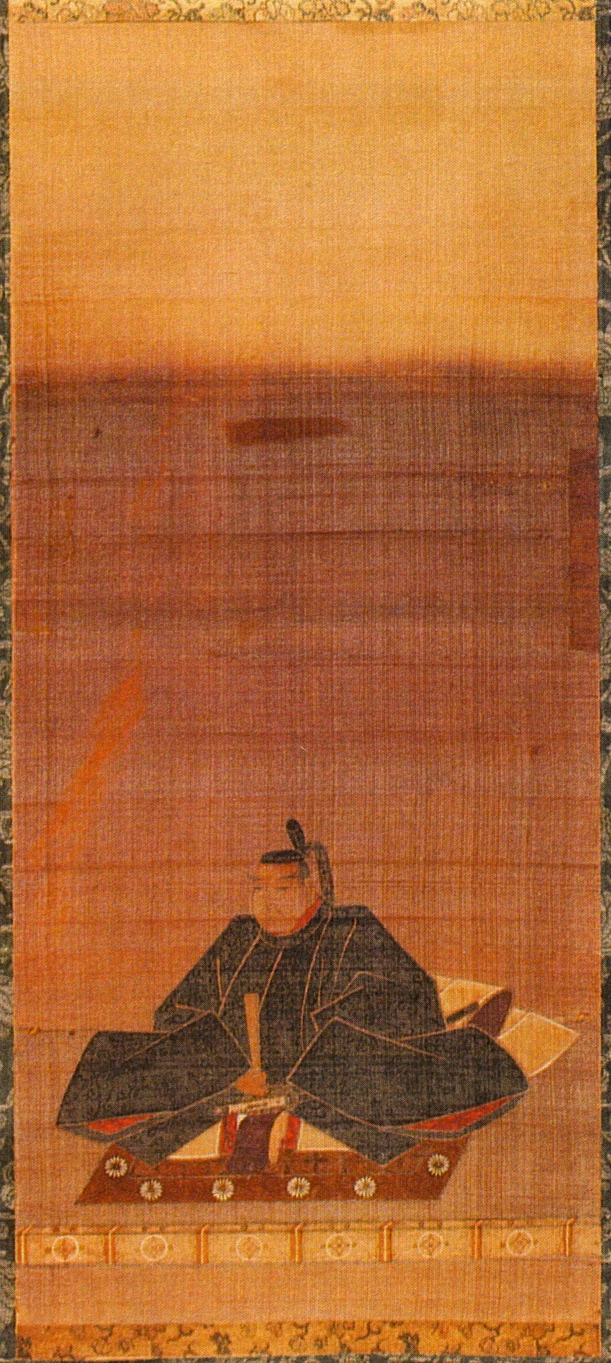 宗義蕃の肖像。